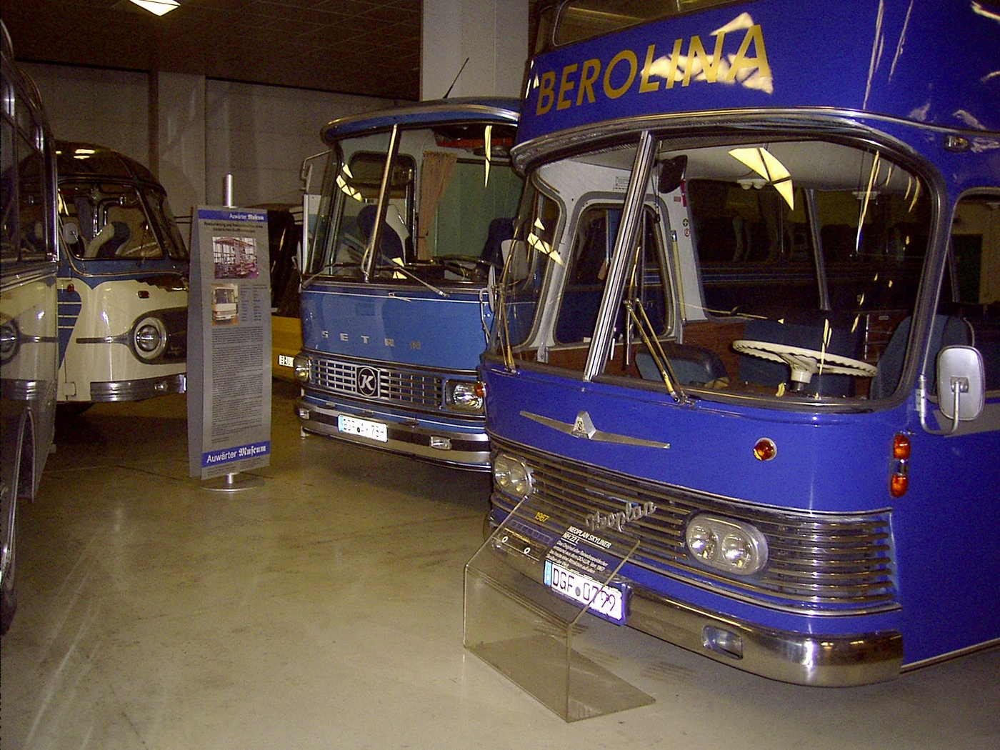 Neoplan Do-Lux und Setra S80 im Neoplan-Museum Stuttgart-Möhringen fotografiert von Tilius 5.1.2006